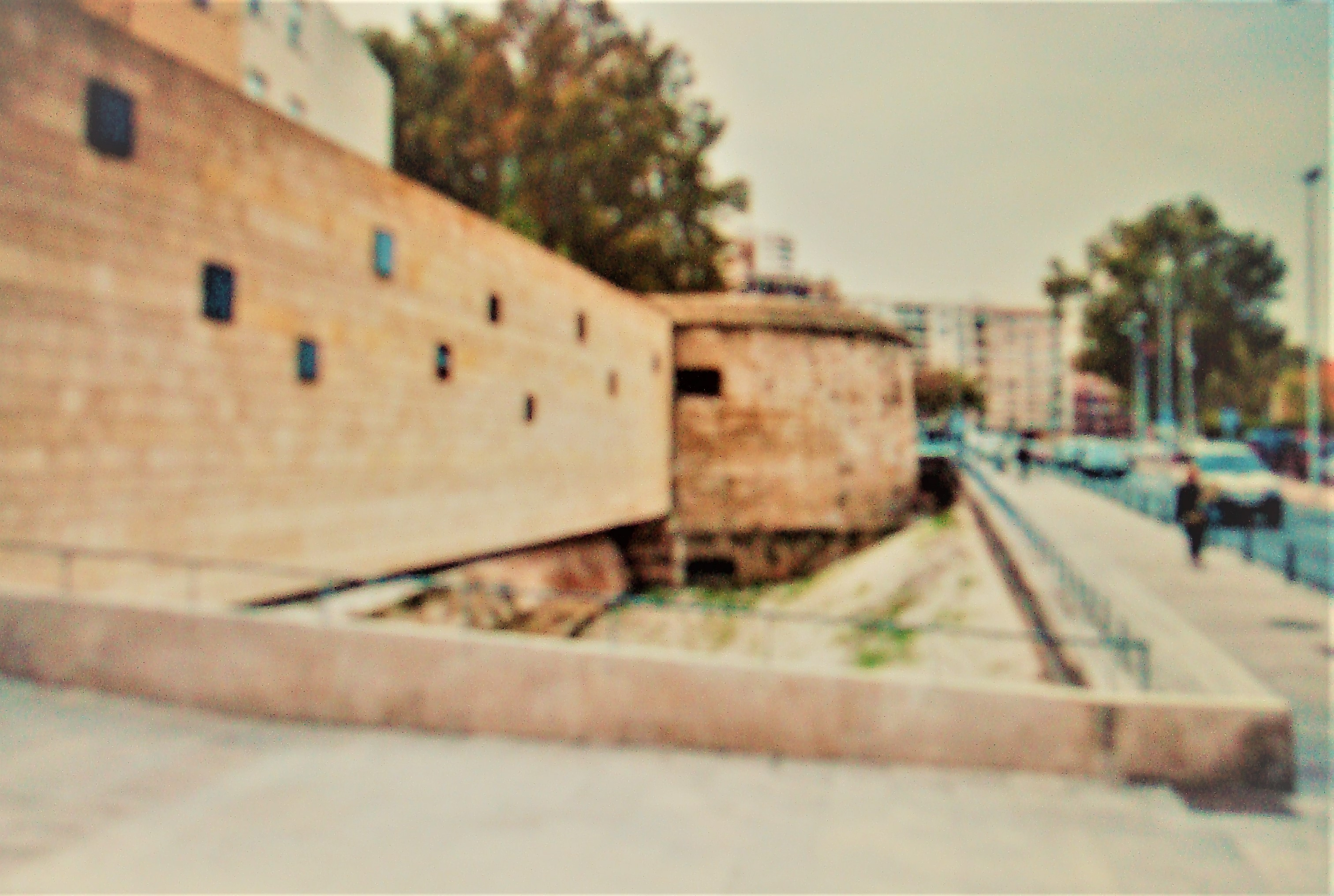 Vistas Hermosas